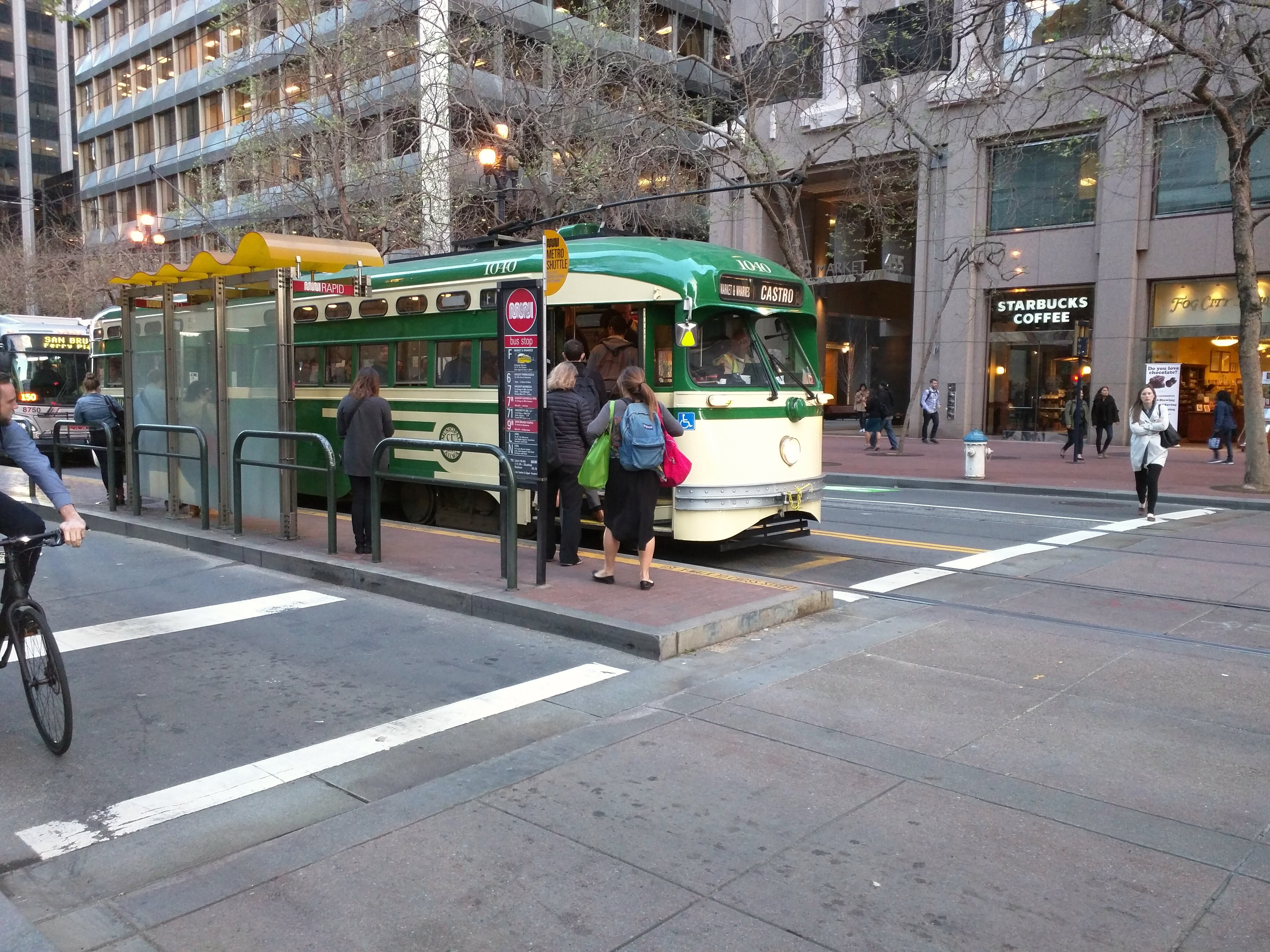 1040, San Francisco :)